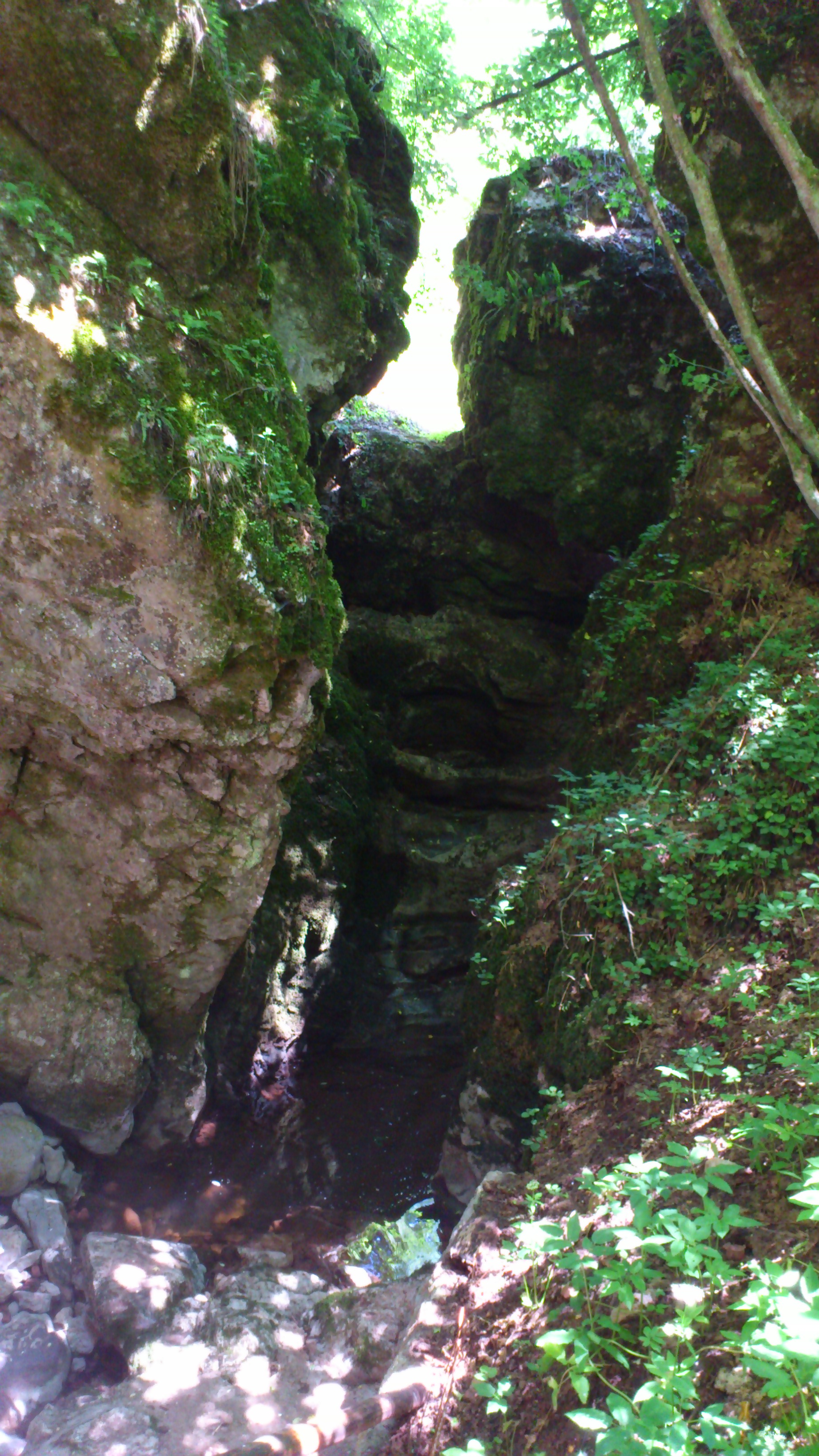 Vodopad na ulazu u Cerjansku pećinu